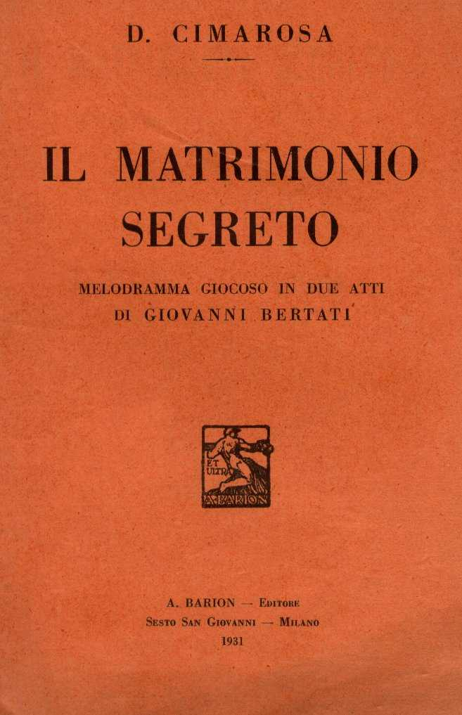 Copertina libretto "Il matrimonio segreto" melodramma giocoso in due atti di Giovanni Bertati musica di D. Cimarosa - editore Attilio Barion Sesto San Giovanni - Milano 1931